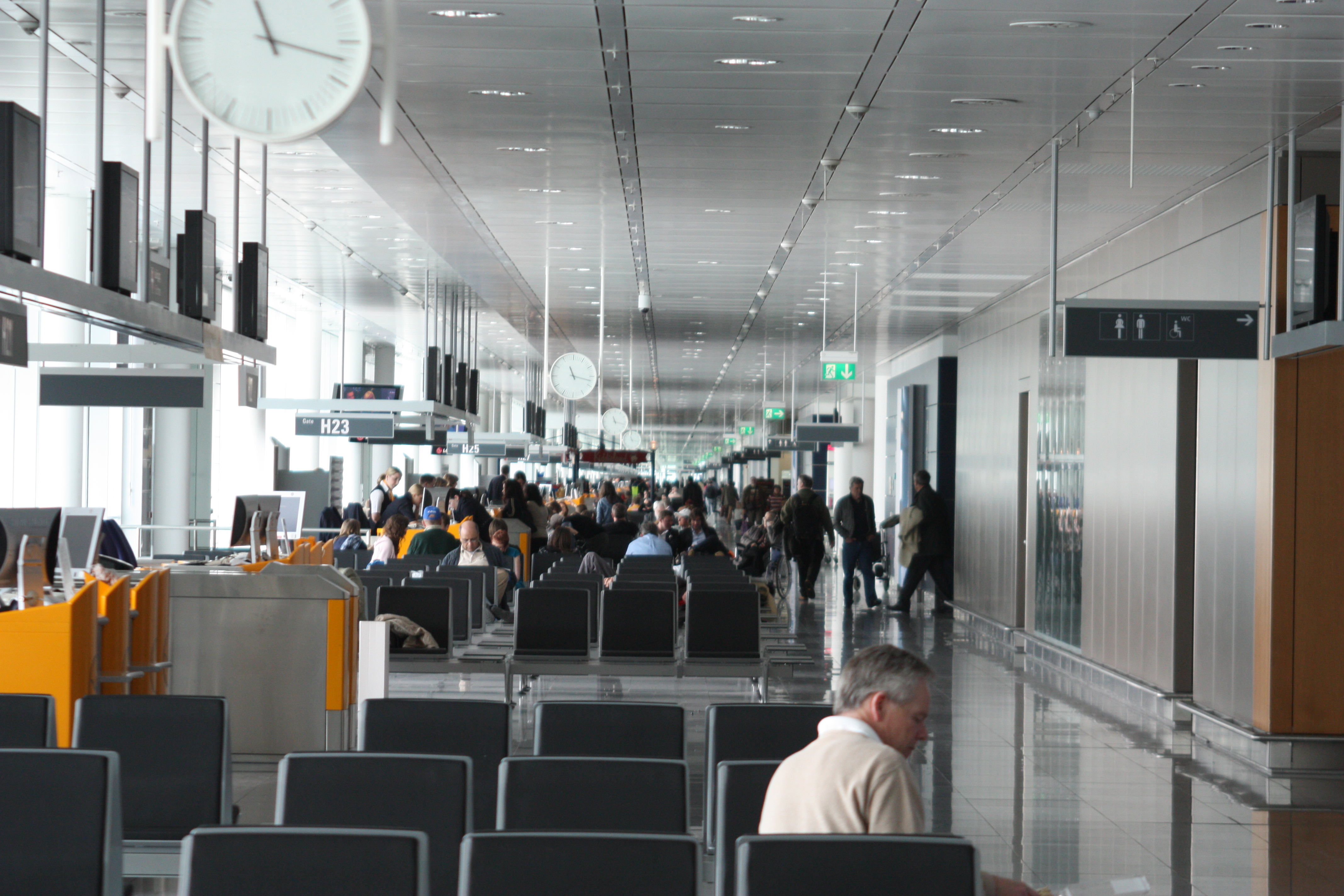 Airport Munich innen